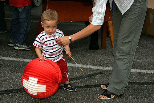 Reinach: Kindern werden Lampions geschenkt (Zunft zu Rebmessern)